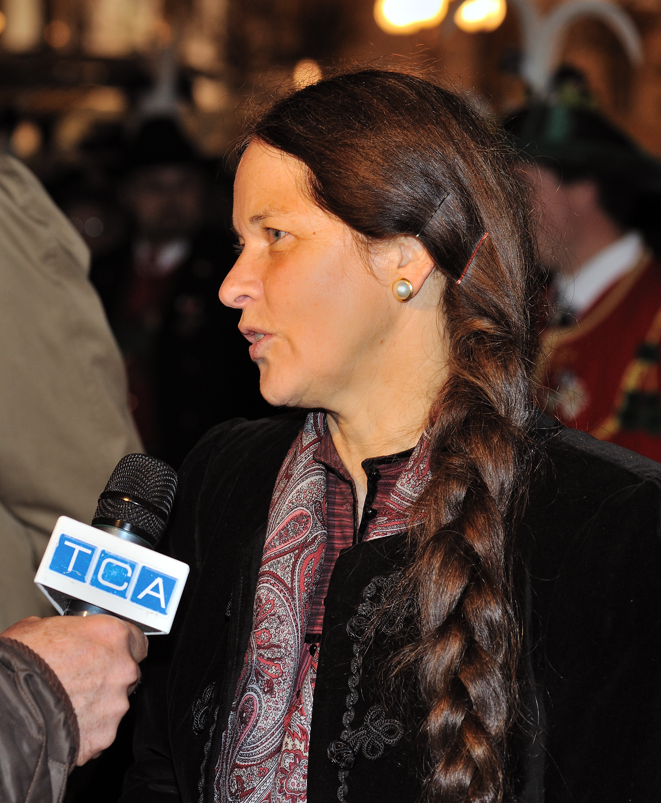 Frau Dr. Eva Klotz, Landtagsabgeordnete im Südtiroler Landtag für die Bewegung "Süd-Tiroler Freiheit" beim Interview während der Schützen-Demonstration in Bozen am 08.11.2008